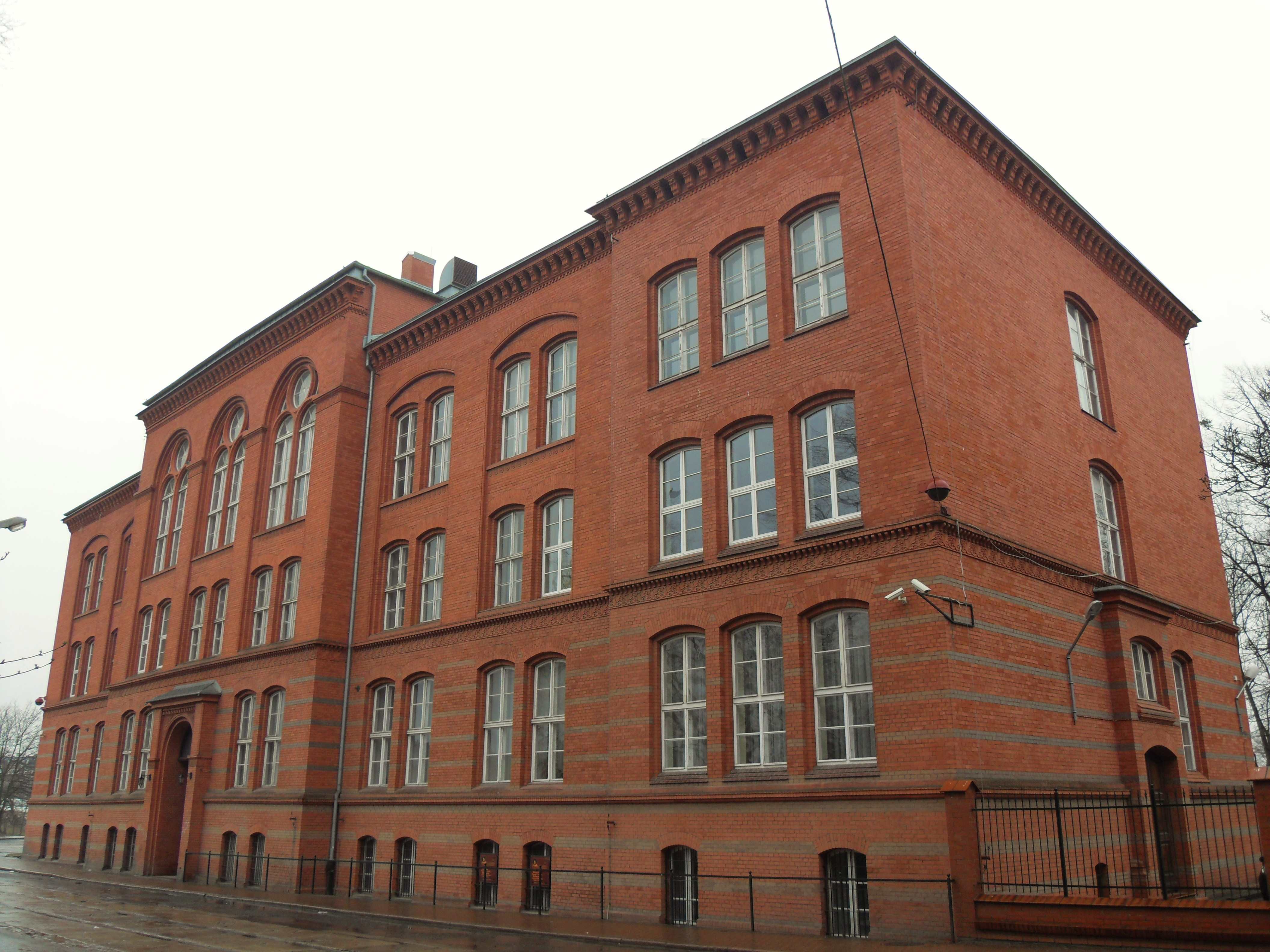 Gdańsk Długie Ogrody, ul. Łąkowa 1.